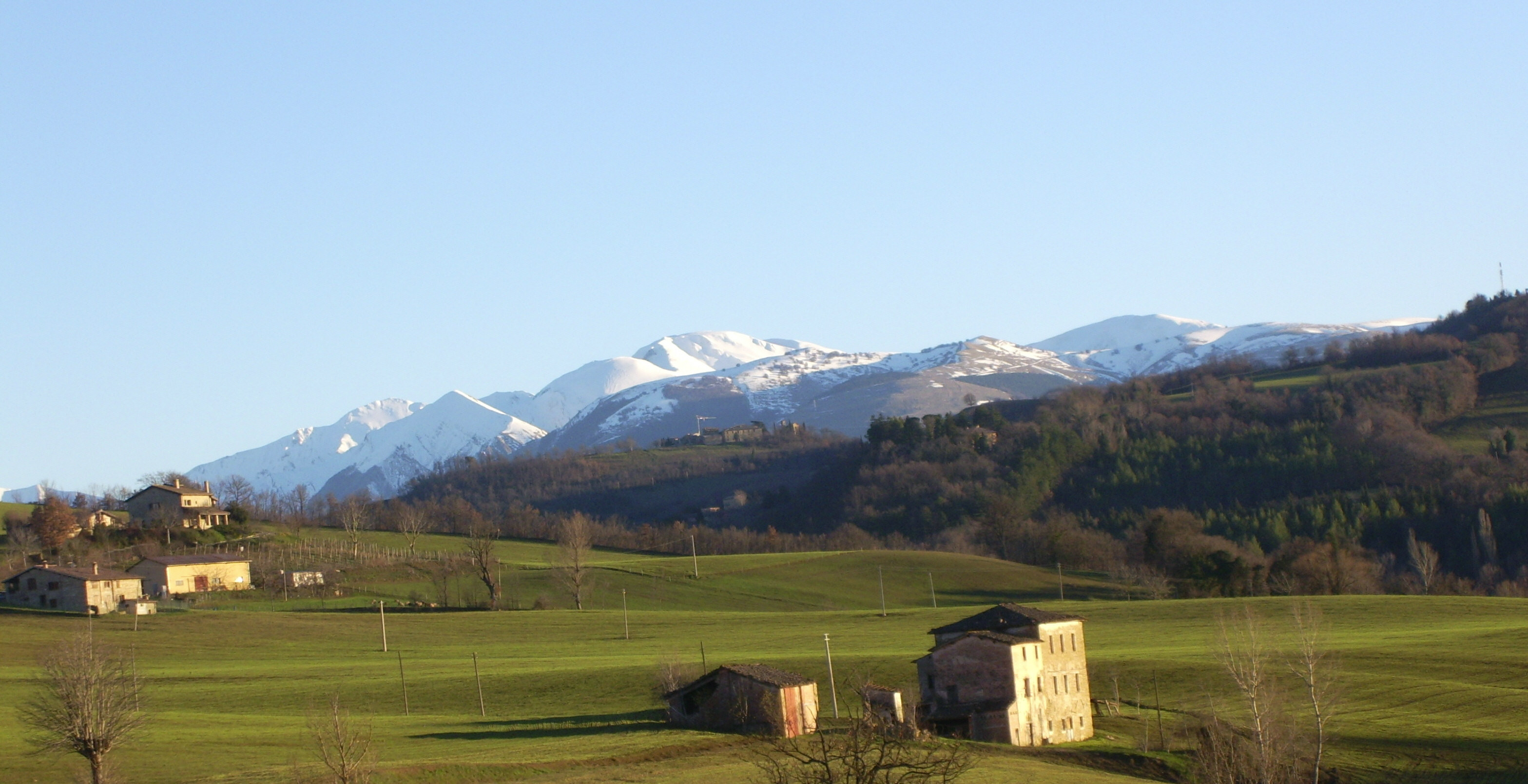 I Monti Sibillini visti dalla campagna di Camerino